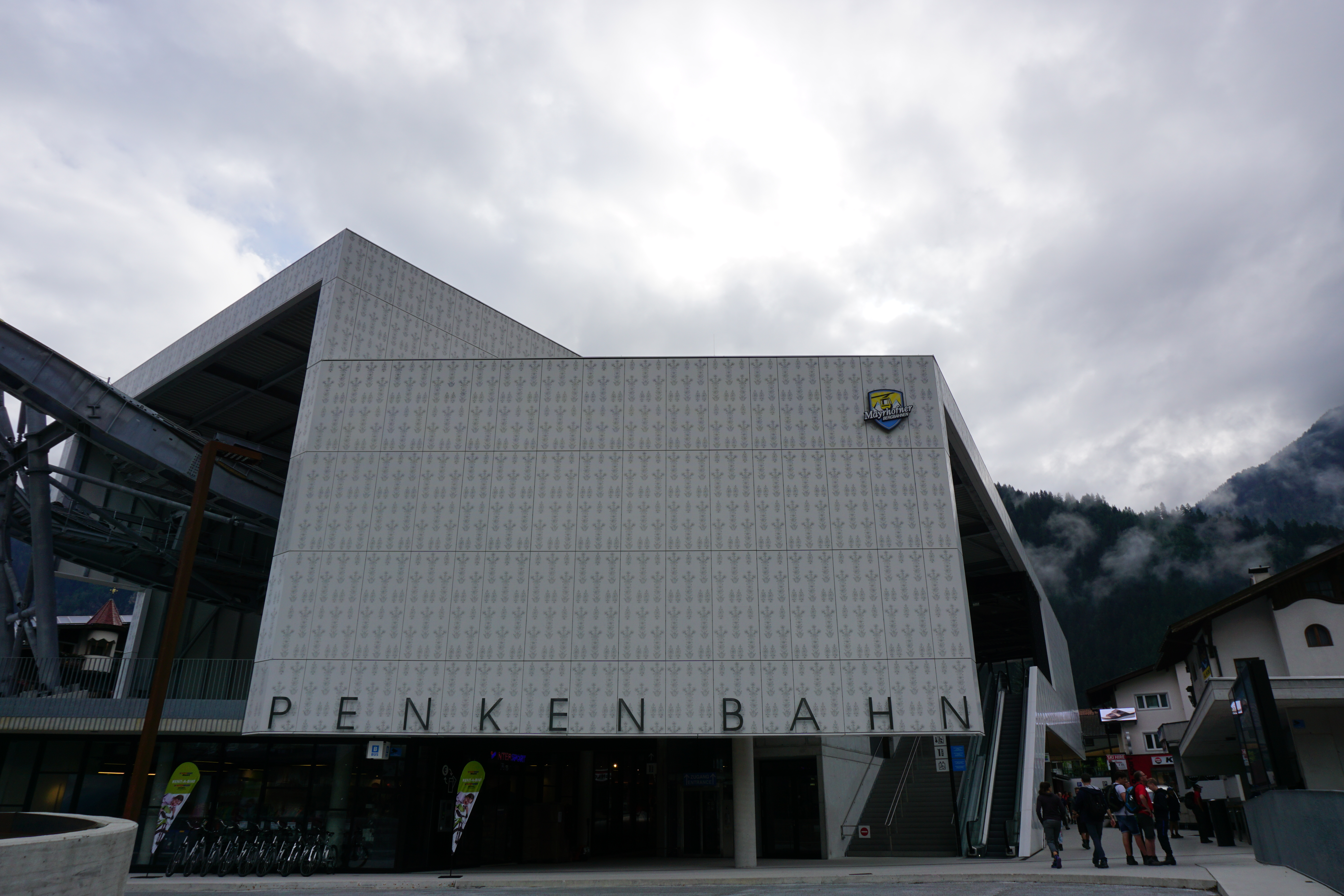 Talstation der Penkenbahn in 2017